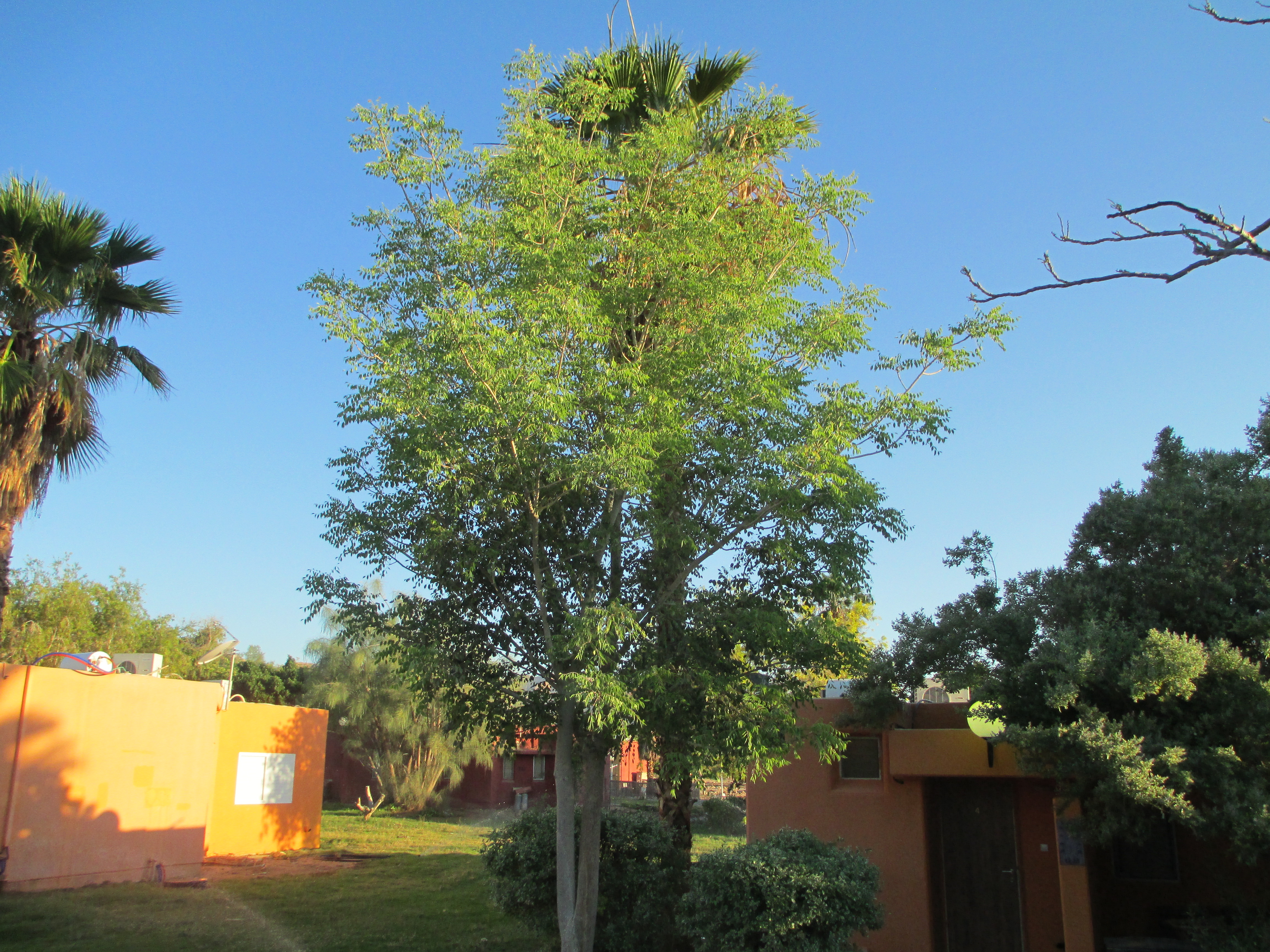 עץ מרולה נקבי בקיבוץ אליפז